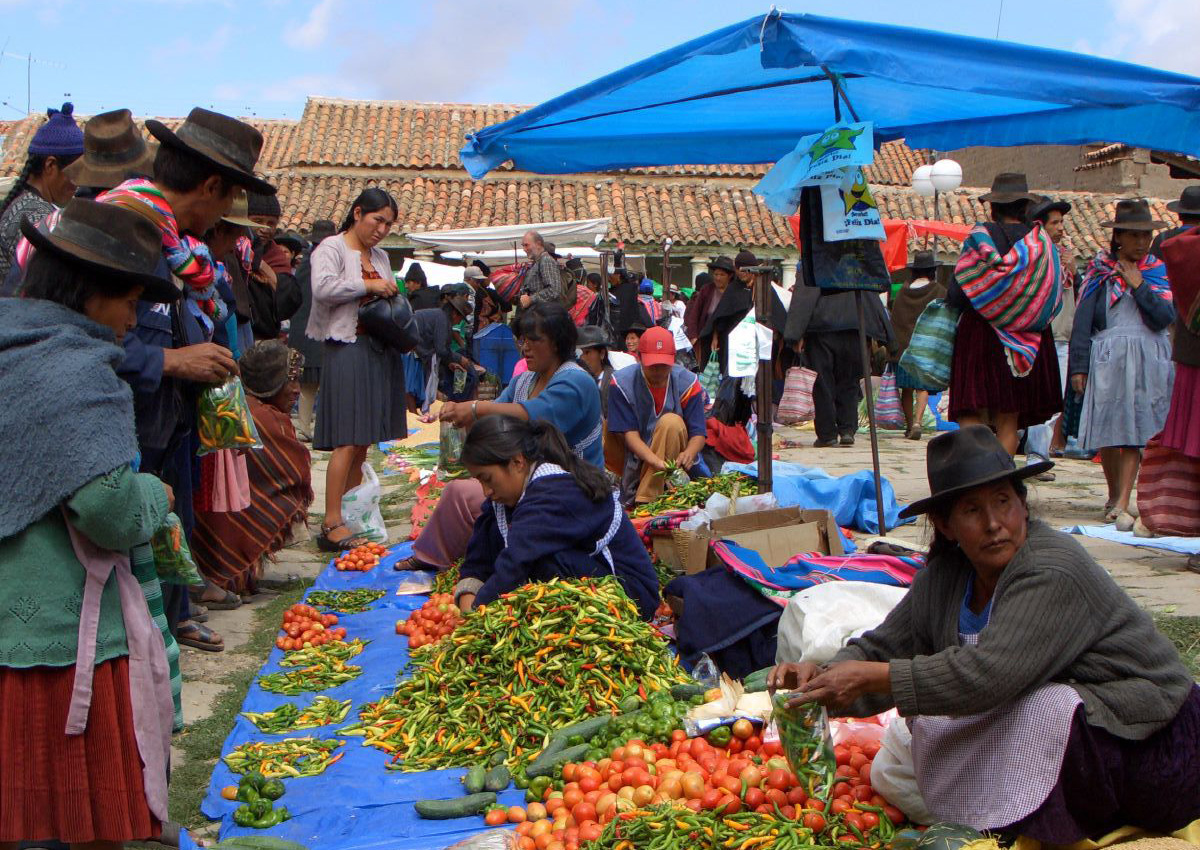 Market in Tarabuco